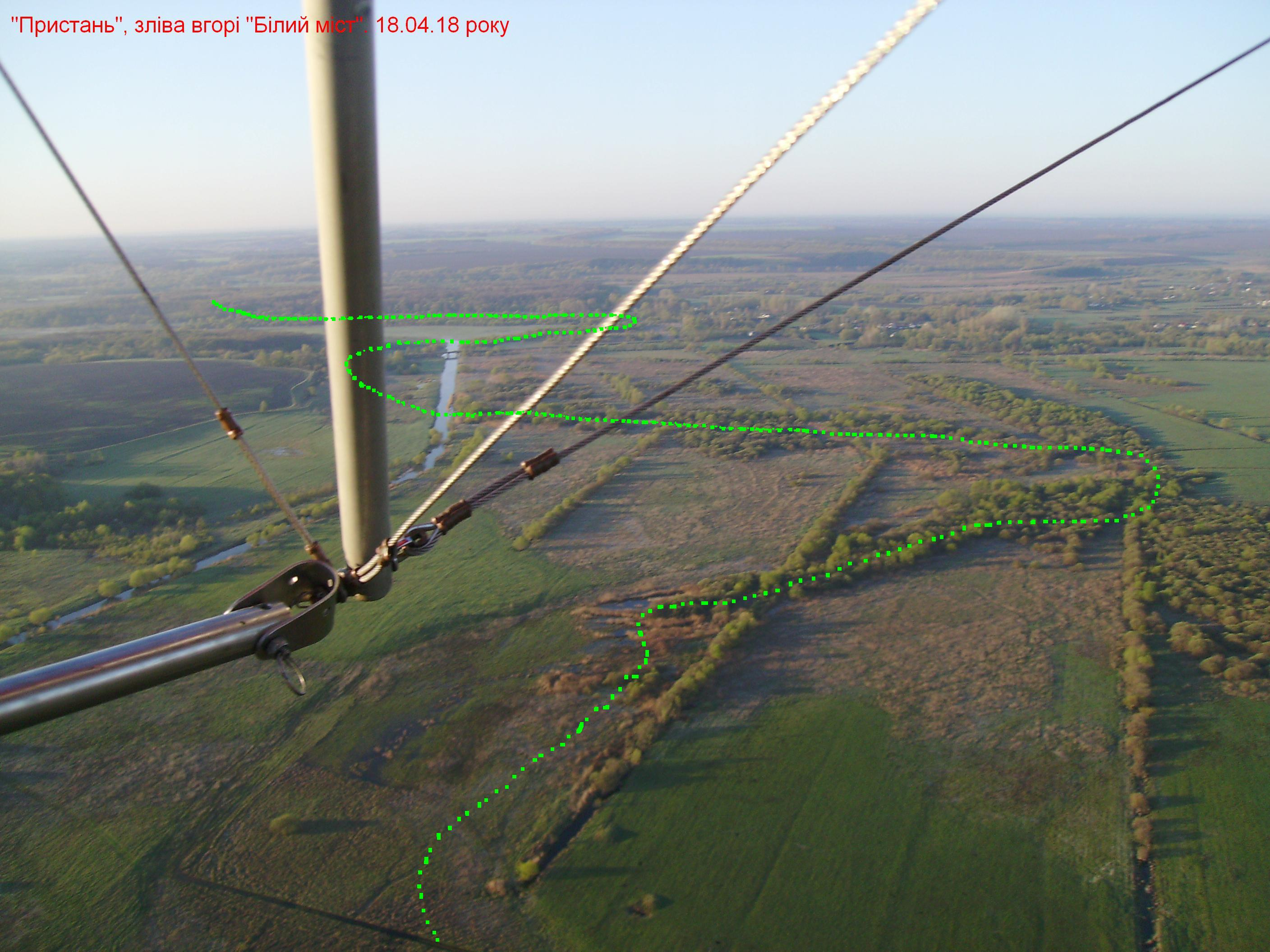 Район "Пристань" - старорічище р.Ромен і місце де була човнова пристань до проведення меліоративних робіт. За сучасними городами вул.Першотравнева (Кути)